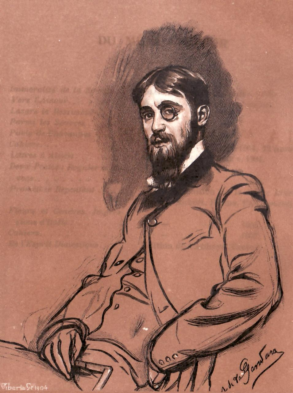 André Rouveyre par Antonio de La Gandara gravé par P.-E. Vibert [1904] reproduit dans une étude signée Mecislas Golberg, "La morale des lignes", Paris, Messein, 1908.